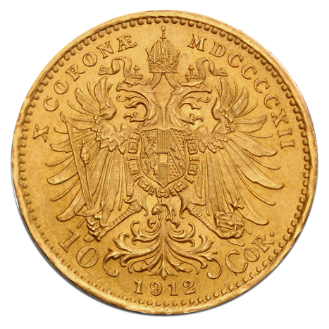 Wertseite einer 10 Kronen-Münze mit dem Konterfeit von Franz-Joseph I.